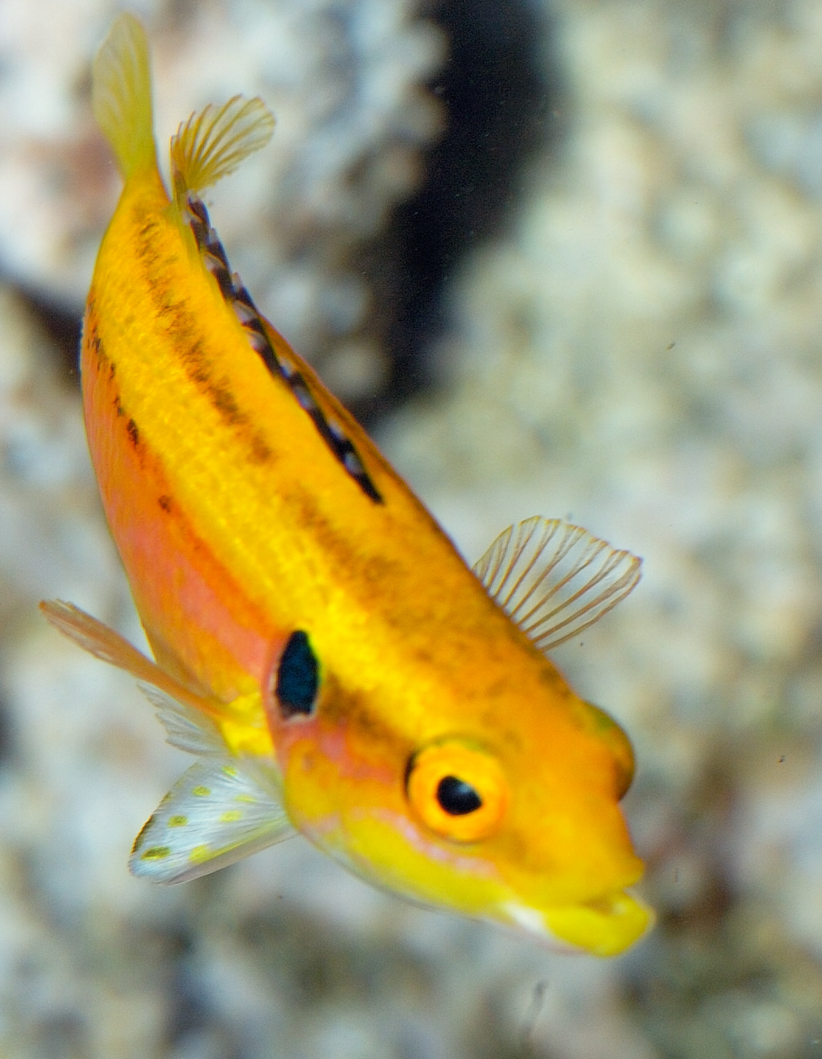 Bodianus bimaculatus in an aquarium